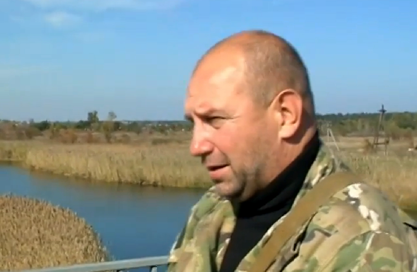 Сергій Петрович Мельничук, засновник та перший командир б ТрО «Айдар», на місці першого бою свого підрозділу на річці Айдар в Луганській області, в честь якої і було названо добровольчий тербатальйон. В перекладі з тюркської мови слово «айдар» означає — «сова».